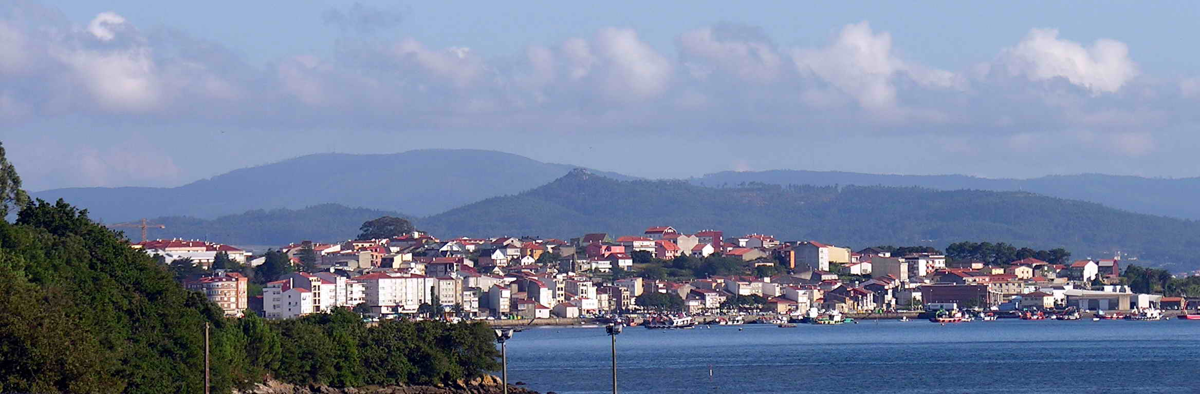 Foto tirada cunha Nikon E8800